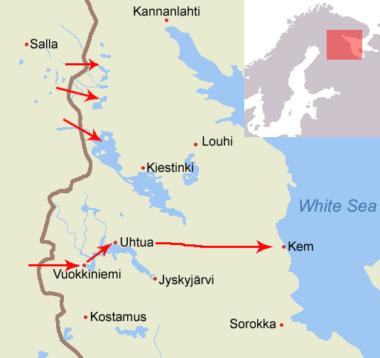 Viena ekspeditionen i 1918. Pilene viser de finske fremstød.